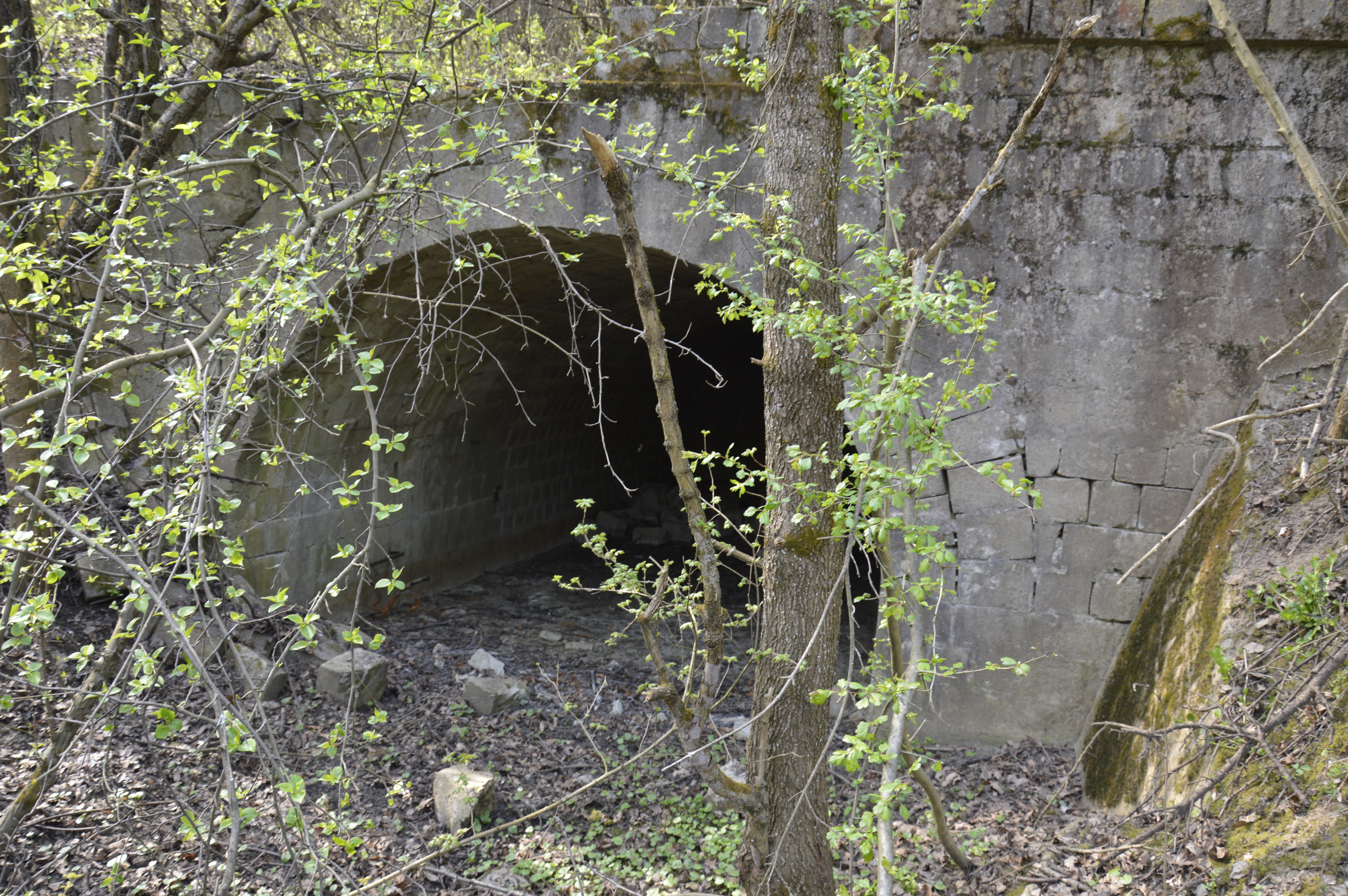 Bányalejáró 3